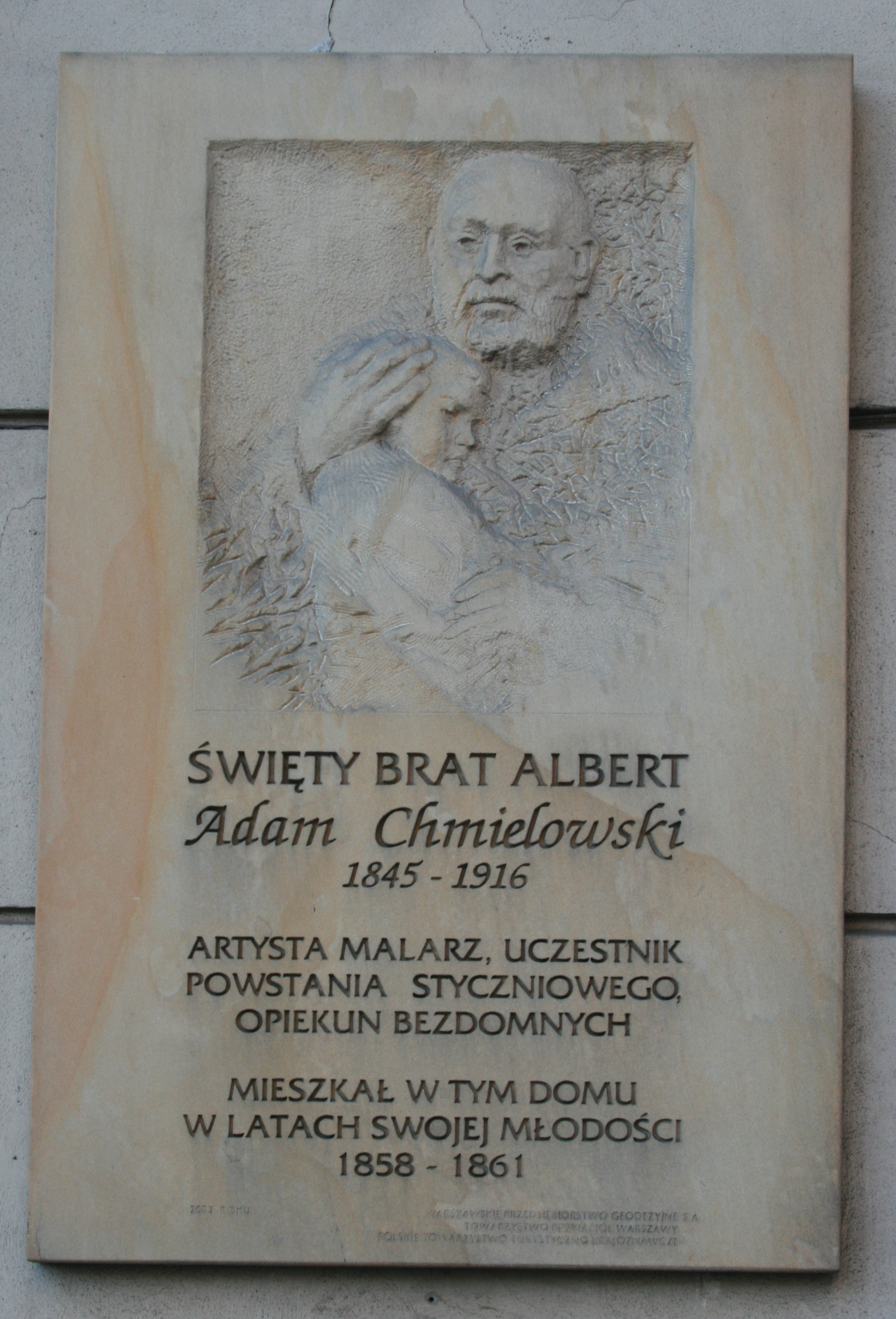 Tablica poświęcona Albertowi Chmielowskiemu na ścianie budynku przy ul. Książęcej 6